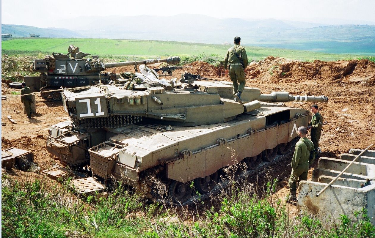 טנק ותומ"ת ברחבת הרק"מ של מוצב שרייפה ברצועת הביטחון בדרום לבנון (התמונה צולמה על ידי שחר ב 1998)